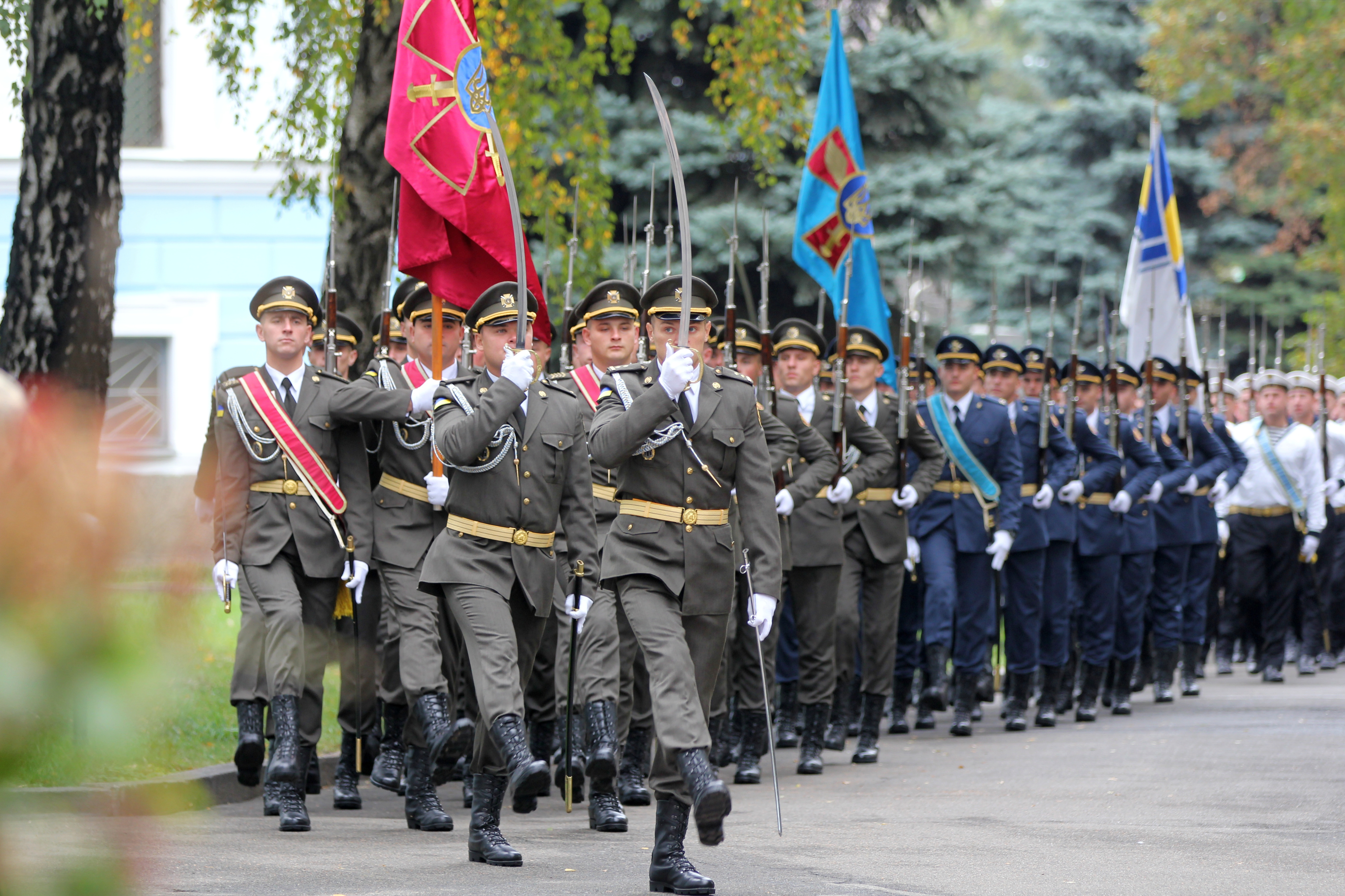 Автор фото: Віталій Солоний